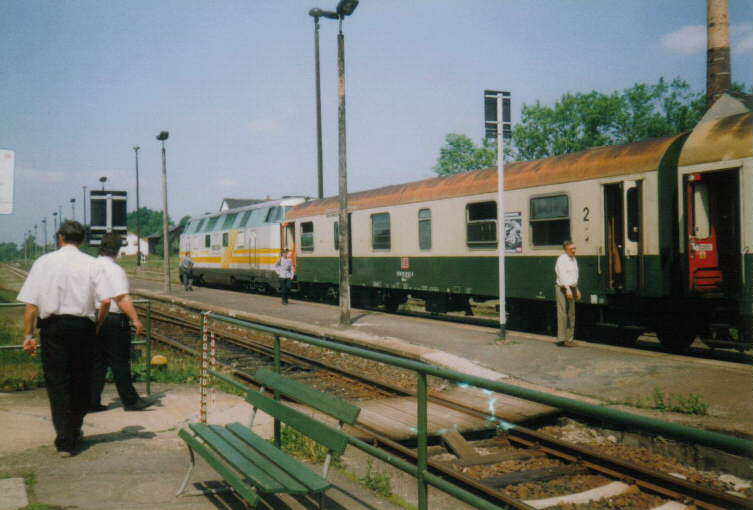 Letzter Betriebstag der Eisenbahn von Wünschendorf/Elster nach Werdau in Seelingstädt, 29. Mai 1999.